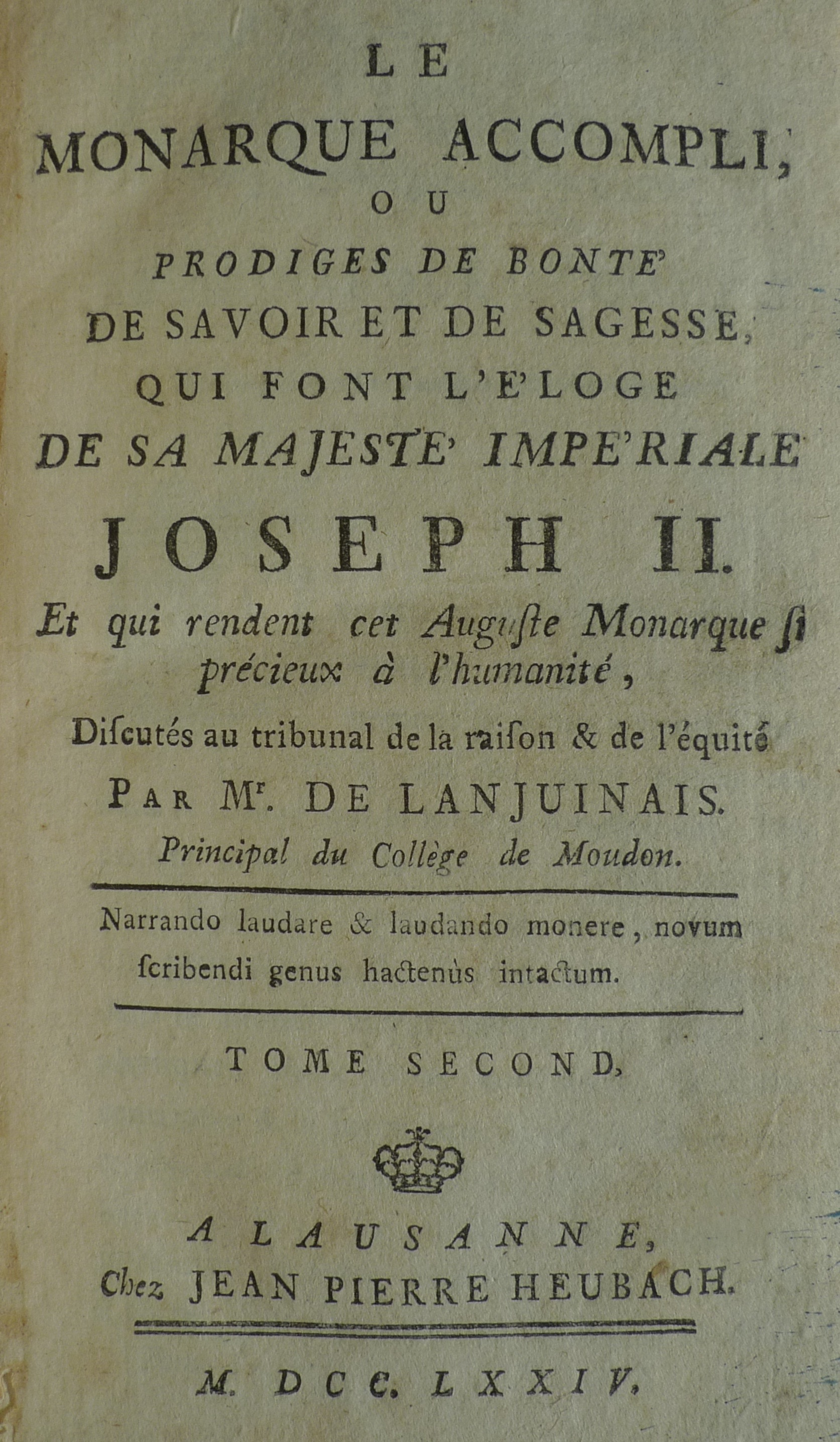 (Pierre-Julien) de Lanjuinais: Le Monarque accompli, 3 Bände, Lausanne 1774.